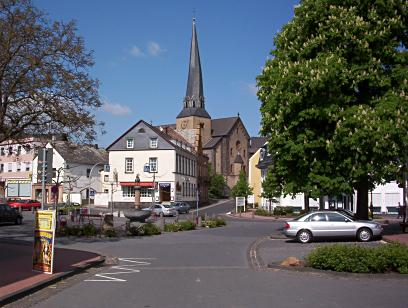 Bildbeschreibung: Kaisersesch in Richtung Kirche und Brunnen Quelle: selbst fotografiert Fotograf/Zeichner: Peter Goerig Datum:16.05.2004